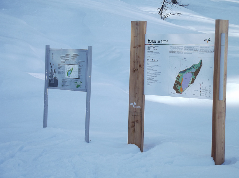 Étang de Lo Ditor (Torgnon, AO)